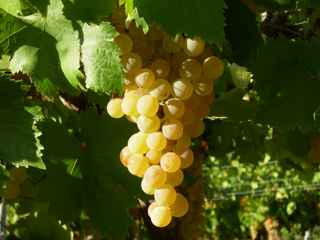 Uva pisquera. Predio en las cercanías de Ovalle, Chile